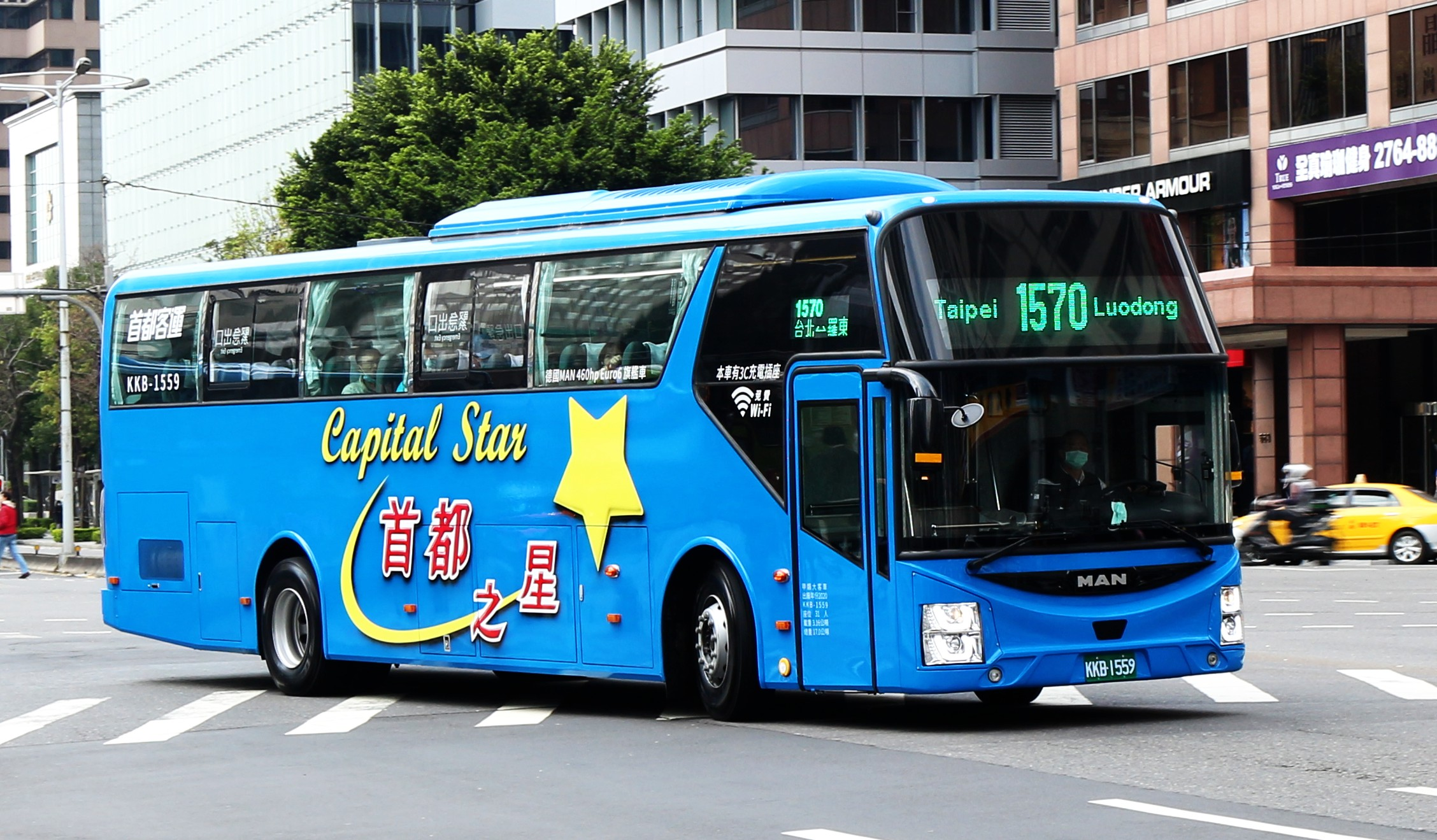 中文（台灣）: 首都客運2020年MAN 19 460 CO大客車KKB-1559行駛1570線